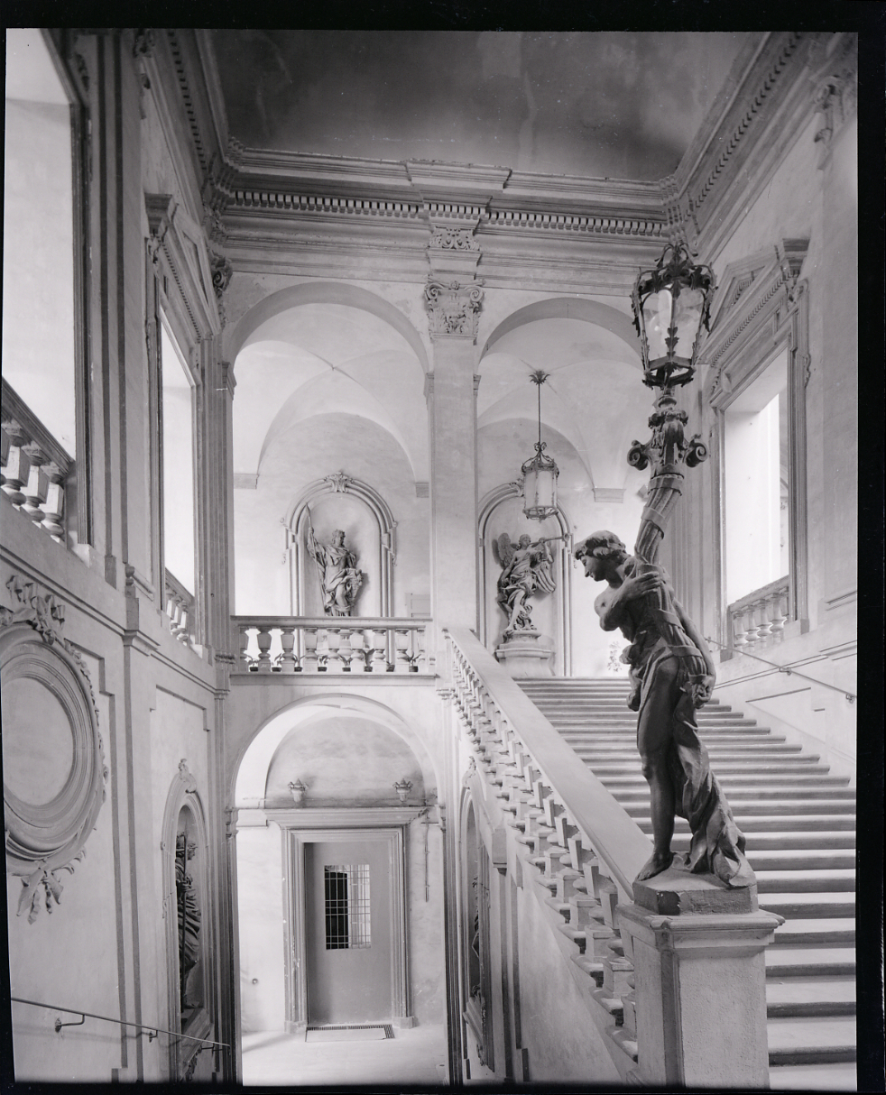 Servizio fotografico : Bologna, 1969 / Paolo Monti. - Buste: 88, Fototipi: 88 : Negativo b/n, gelatina bromuro d'argento/ pellicola ; 10x12. - ((Serie costituita da 56 negativi identificati con i nn.: 15167-15172bis, 15173-15177bis, 15178-15203 bis, 15204--15206bis, 15207-15207bis, 15208-15210bis, 15211-15211bis, 15212-15216ter, 15217-15232bis, 15233--15242bis, 15243-15245. La suddetta serie è contenuta nella scatola identificata con la numerazione 15001-15500G. - Occasione: Campagna di rilevamento del centro storico del comune di Bologna. - Occasione: Documentazione per la pubblicazione: Matteucci Anna Maria, "Carlo Francesco Dotti e l'architettura bolognese del Settecento", Bologna, Edizioni Alfa, 1968. - Fonte: Fattura di Paolo Monti: IV. Commesse/ Fattura (1969/05/09), presso Archivio Paolo Monti. - Fonte: Fattura di Paolo Monti: IV. Commesse/ Fattura (1969/07/31), presso Archivio Paolo Monti. - Fonte: Monografia di Matteucci, Anna Maria: Carlo Francesco Dotti e l'architettura bolognese del Settecento, Bologna, Edizioni Alfa (1968)